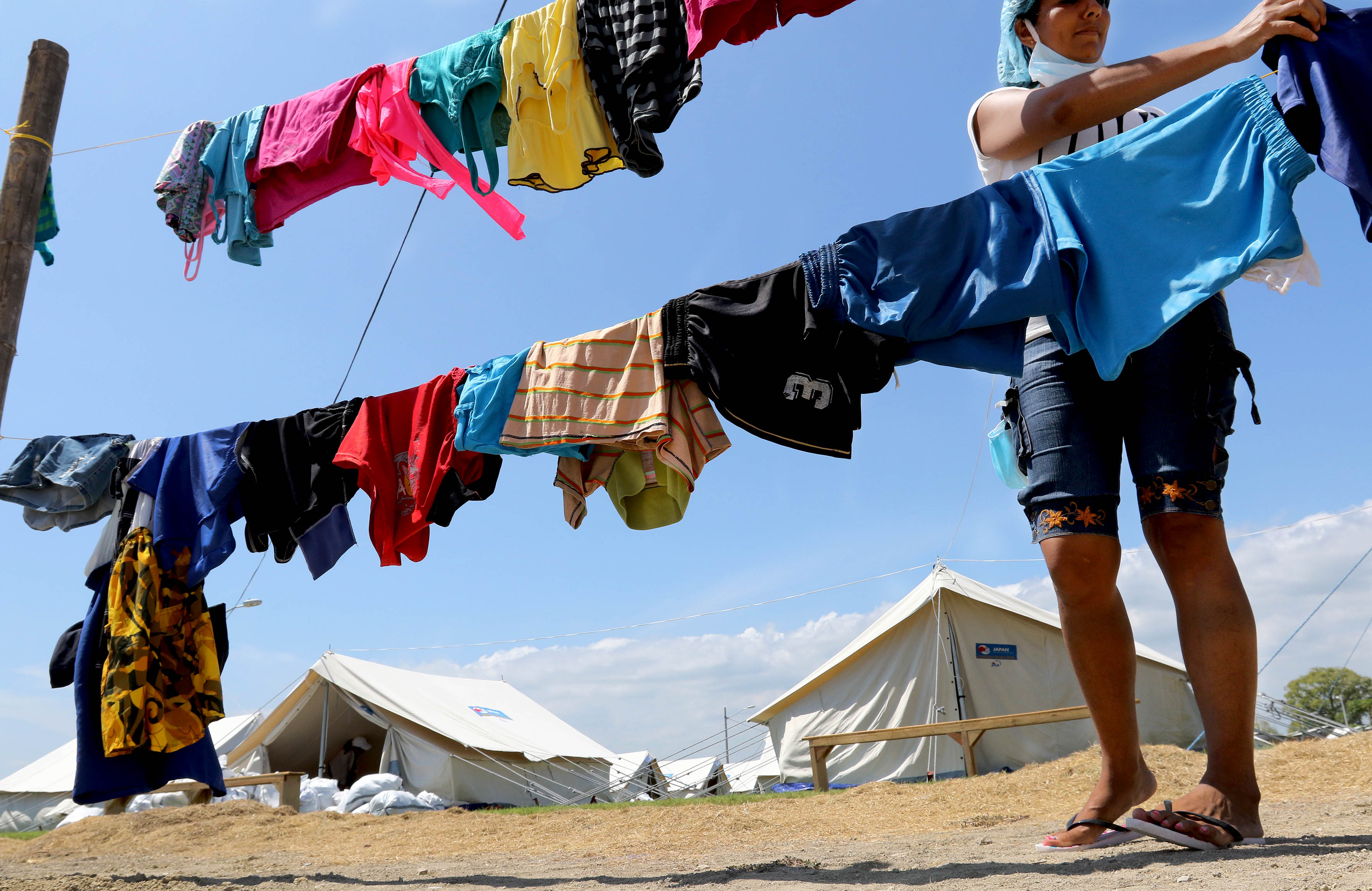 Rocafuerte, Manabi, mayo del 2016 (Andes).-En el estadio de Rocafuerte se levantan carpas que albergan a las personas afectadas por el terremoto del pasado 16 de abril. Foto:César Muñoz/Andes